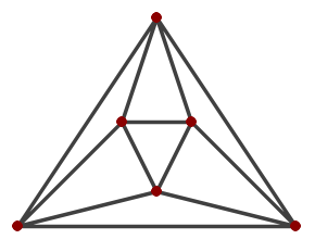 Representació d'un octoedre com a graf pla